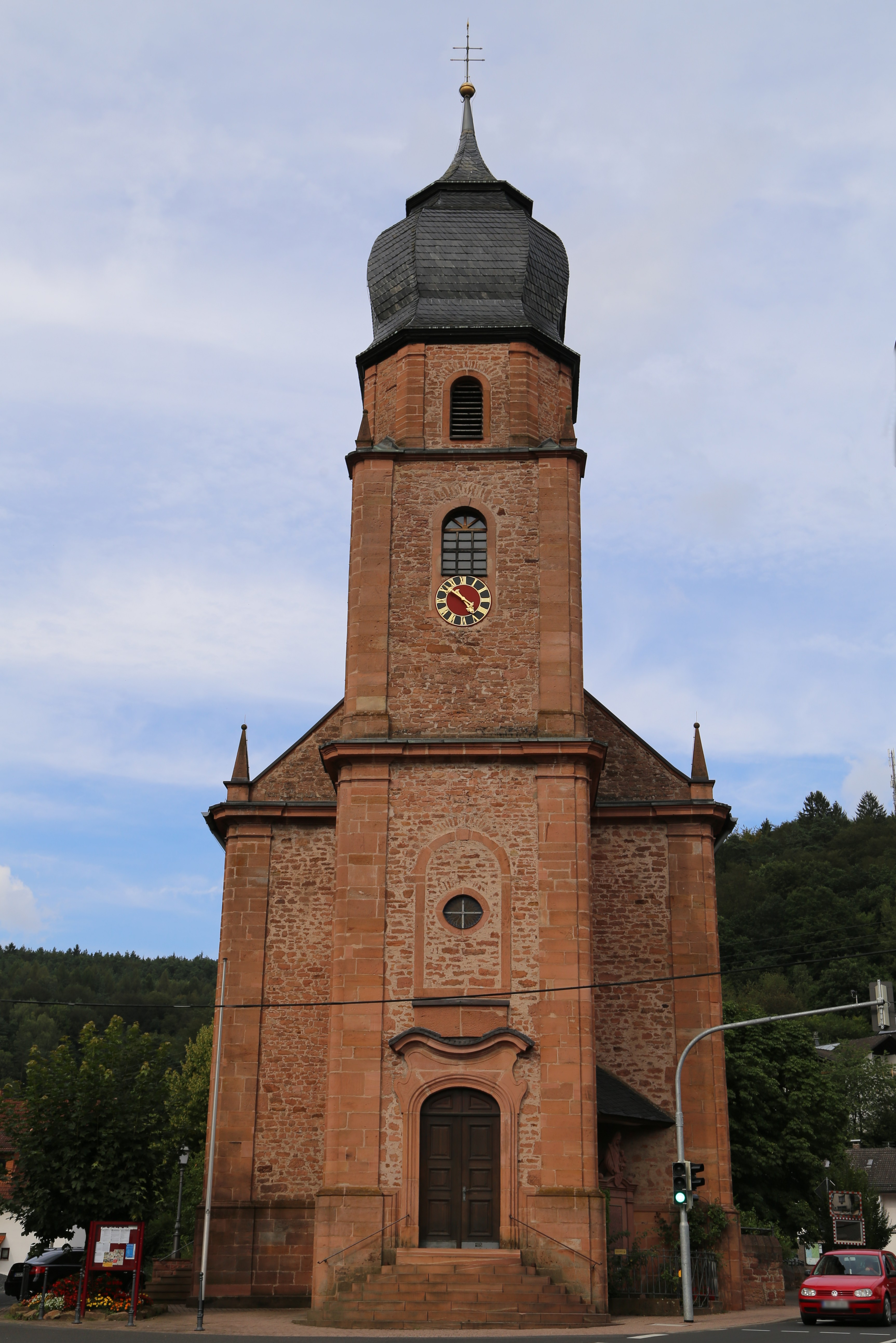 Hauptstraße 27, Heimbuchenthal; Katholische Pfarrkirche St. Martin, Saalkirche mit eingezogenem Chor und Westturm, 1753 ff.; mit Ausstattung